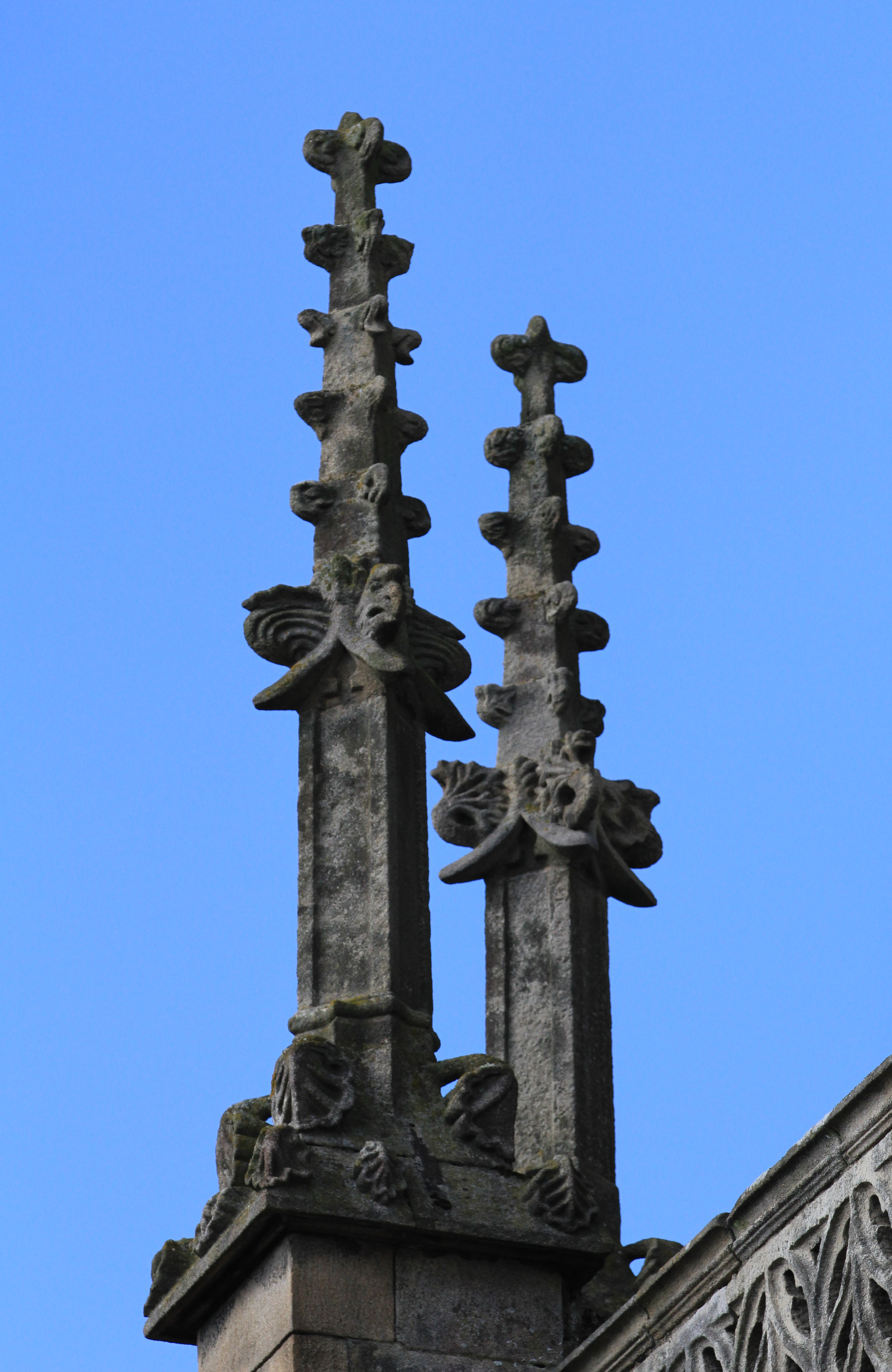 Église Saint-Malo de Dinan, pinacles